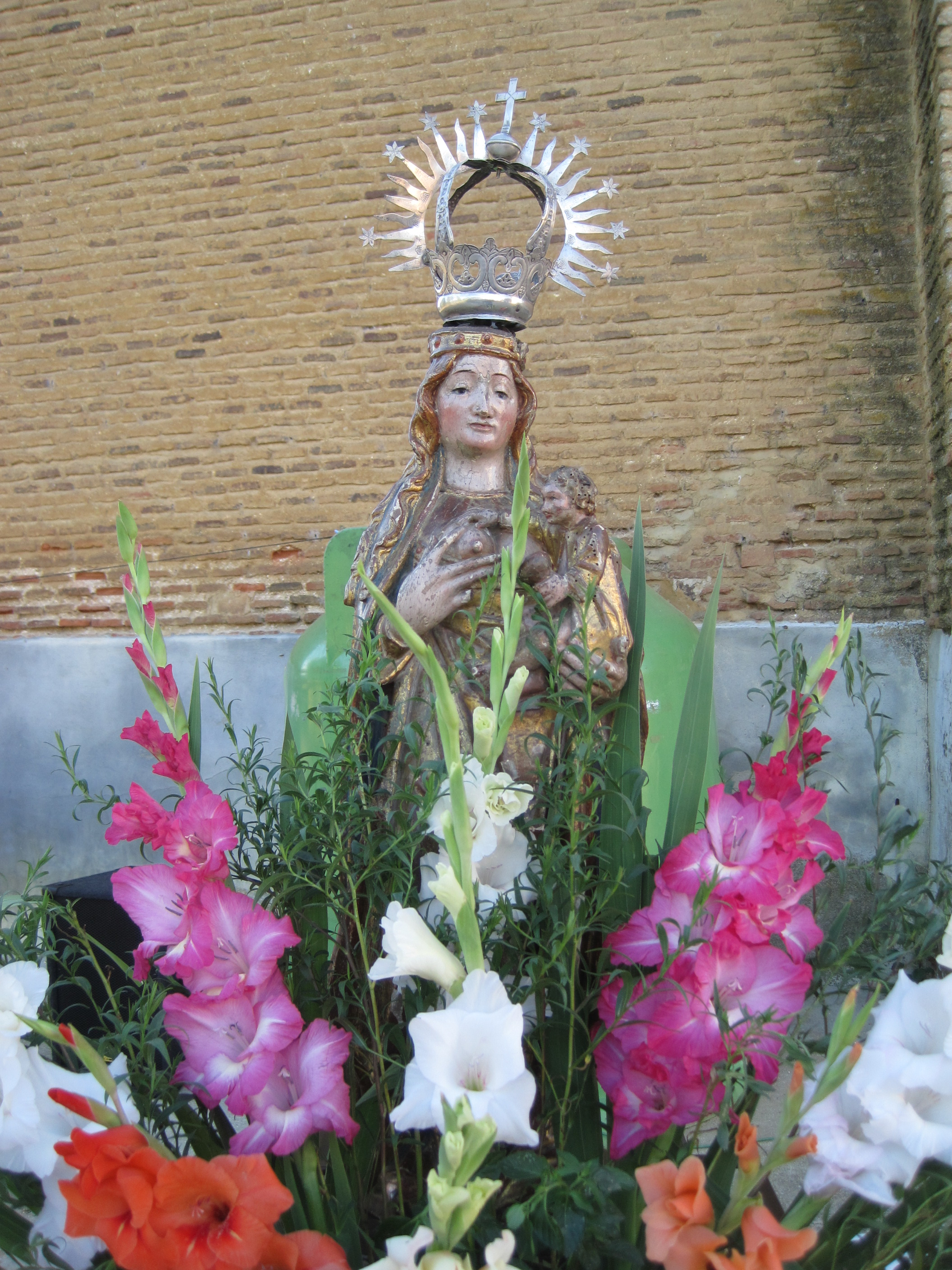 Imagen de la Virgen del Barrio Arriba, de San Román de la Cuba (Palencia, España).